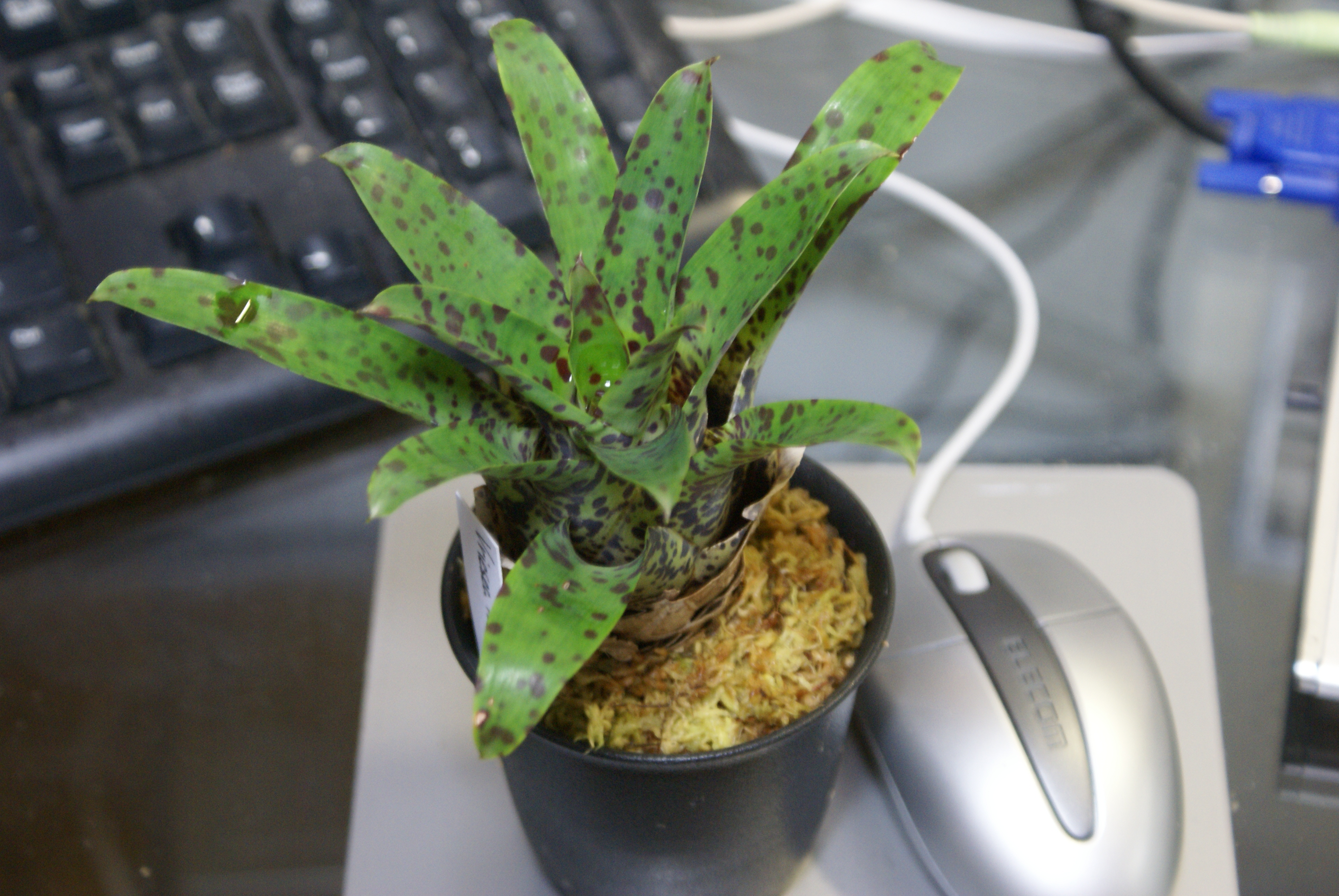 Vriesea racinae